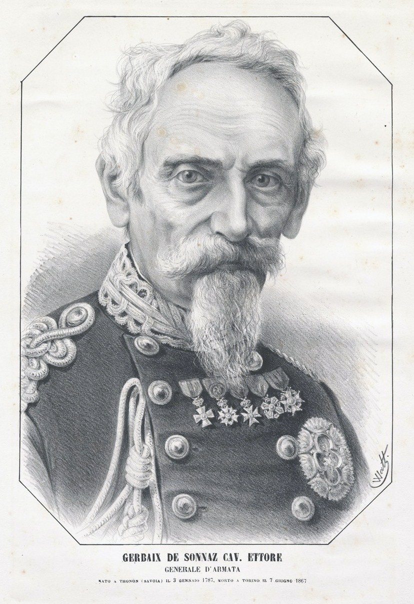 Ettore De Sonnaz, disegno di Watt, in Album del Diavolo, 1867